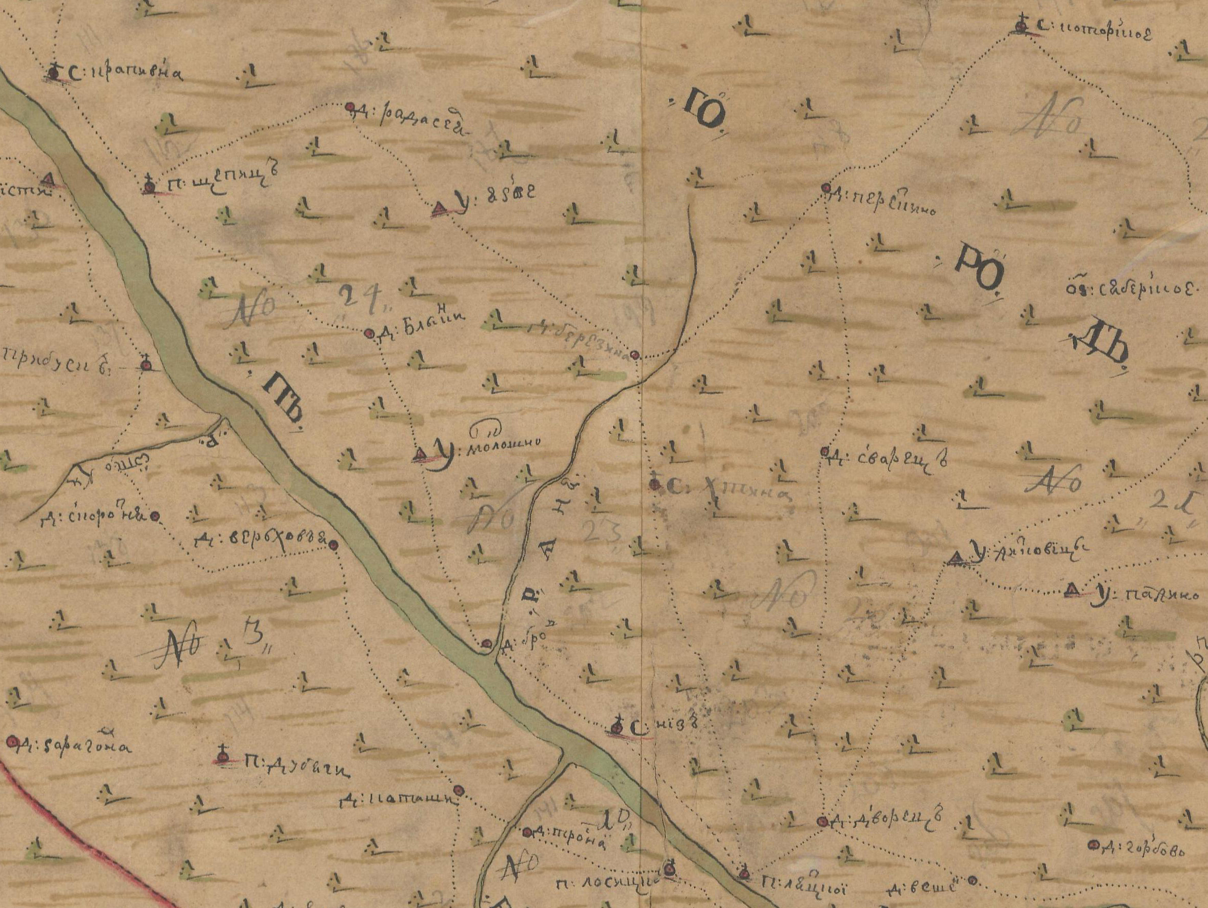 Одно из первых сохранившихся картографических изображений реки Яня (около 1730 года). "Сия Ланткарта содержит опись по рекам Плюсе и Луге и по впадающих [в н]их малым рекам какия по тем рекам имеются леса и насколко прежнею рубкою тех лесов выведено и еще в каком доволствии оныя леса находятся на мачты и к судовым делам и к другим казенным и портикулярным строениям. О том значит во описии."